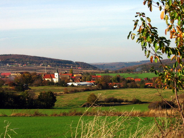 Líšnice